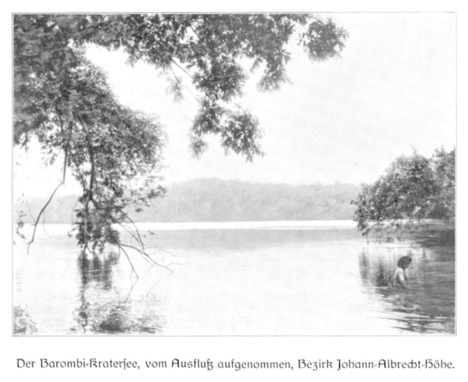 Der Barombi-Kratersee, Bezirk Johann-Albrecht-Höhe